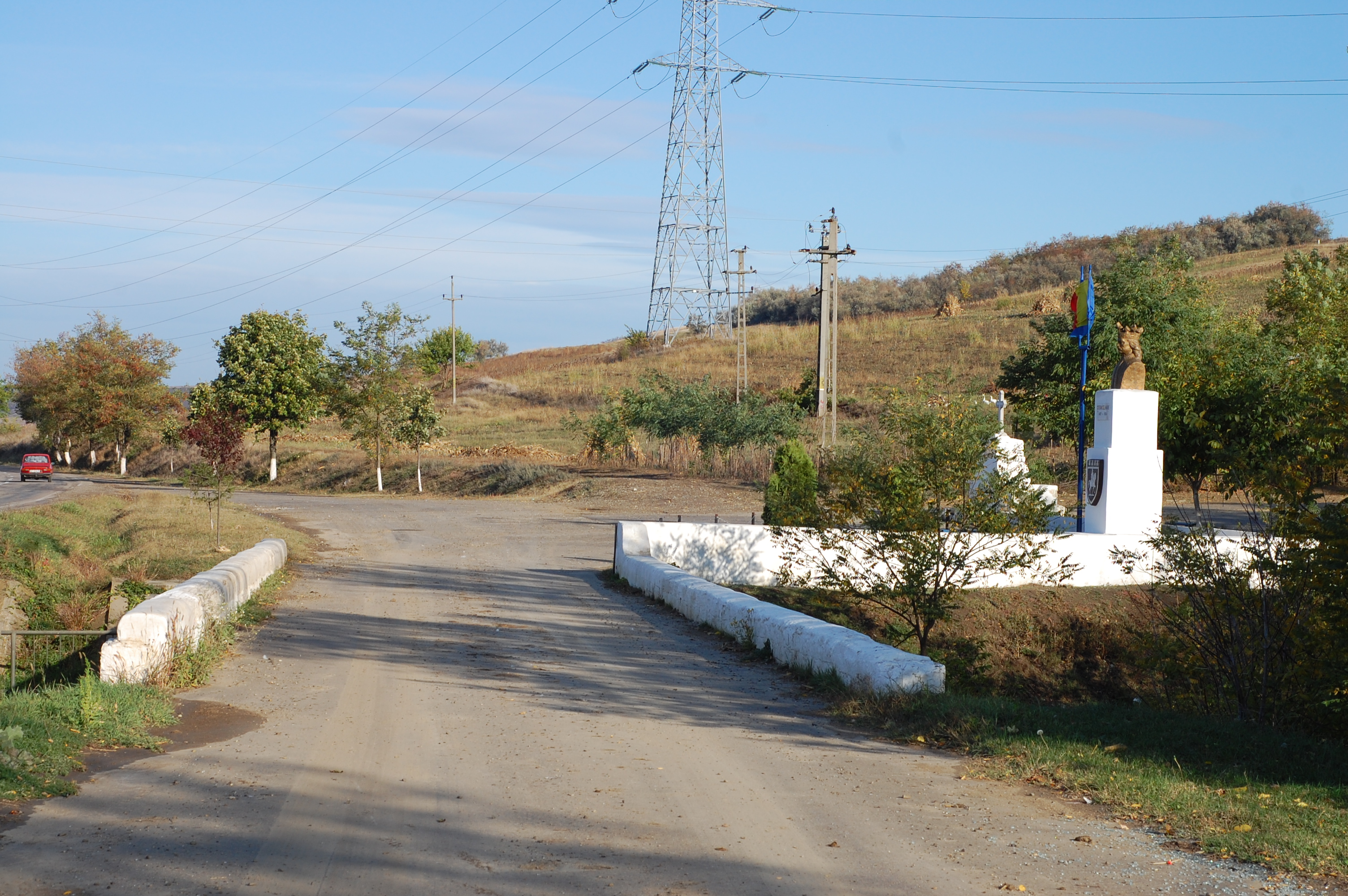 Podul de piatră din Cănţălăreşti, construit în 1626 de către hatmanul Gavril şi bustul domnitorului Ştefan cel Mare(2009). 15 octombrie 2009